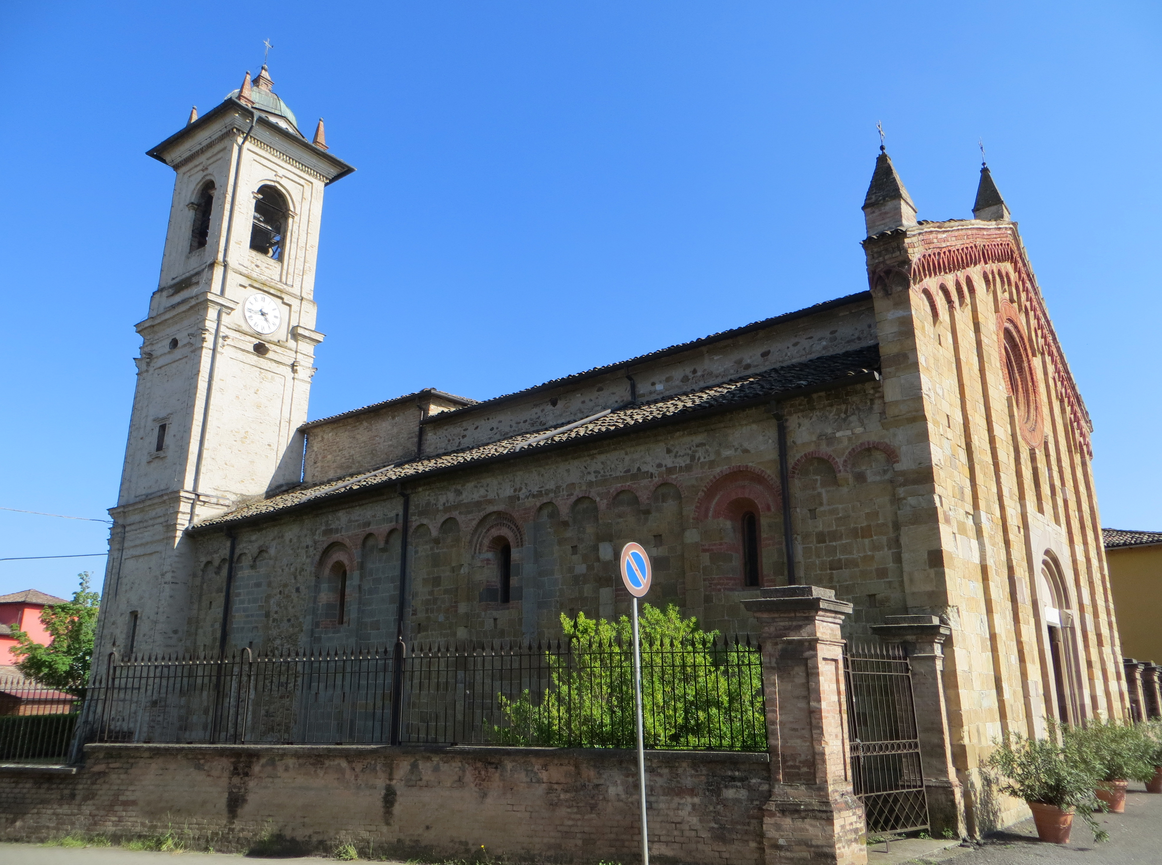 Pieve di San Geminiano (Vicofertile) - fianco nord